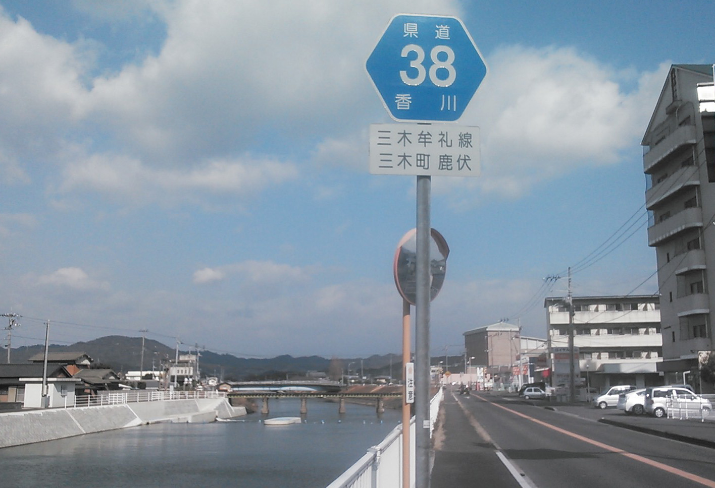 香川県道38号三木牟礼線および新川。投稿者本人による撮影